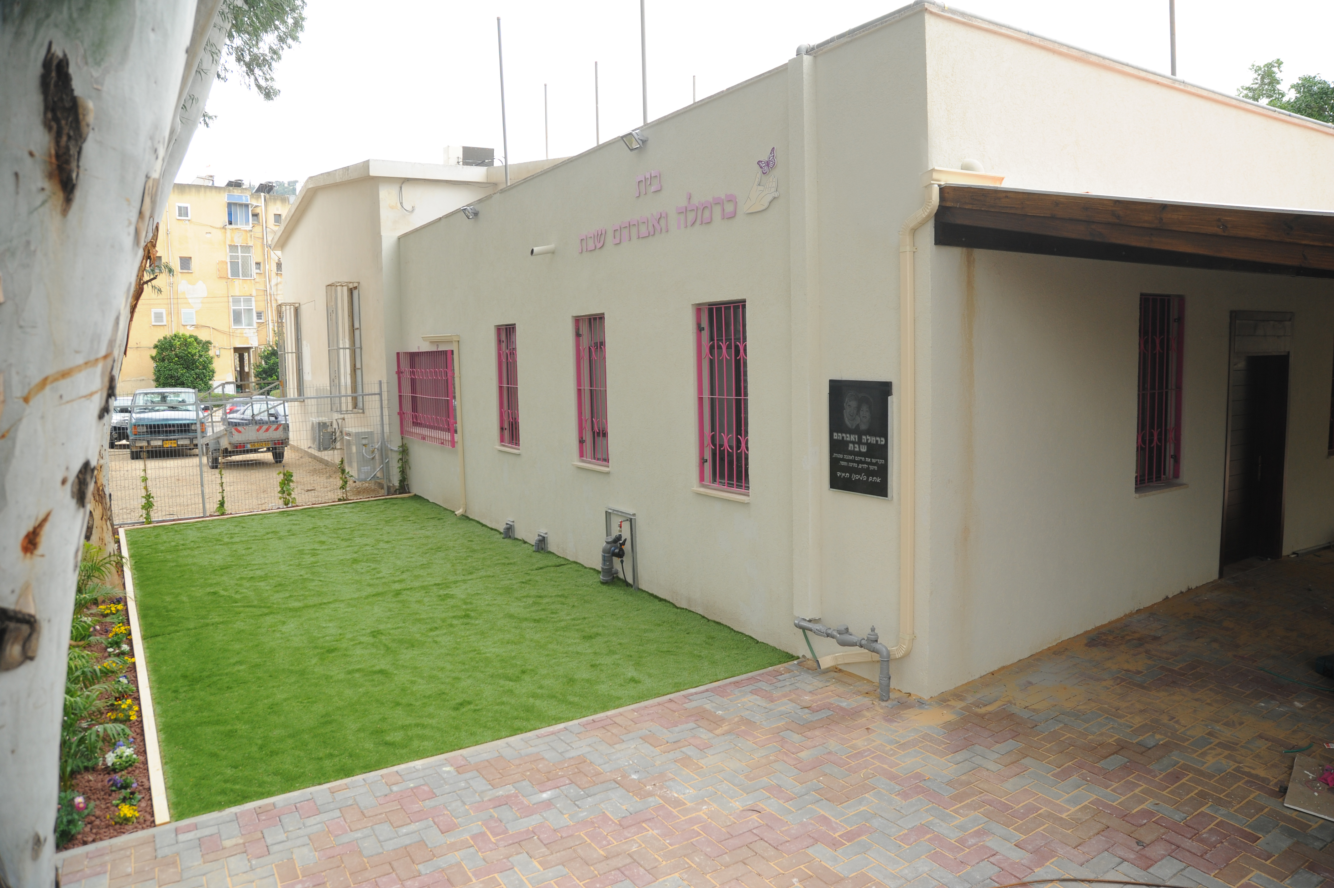 מלונית הנופש בחיפה יד לילד המיוחד